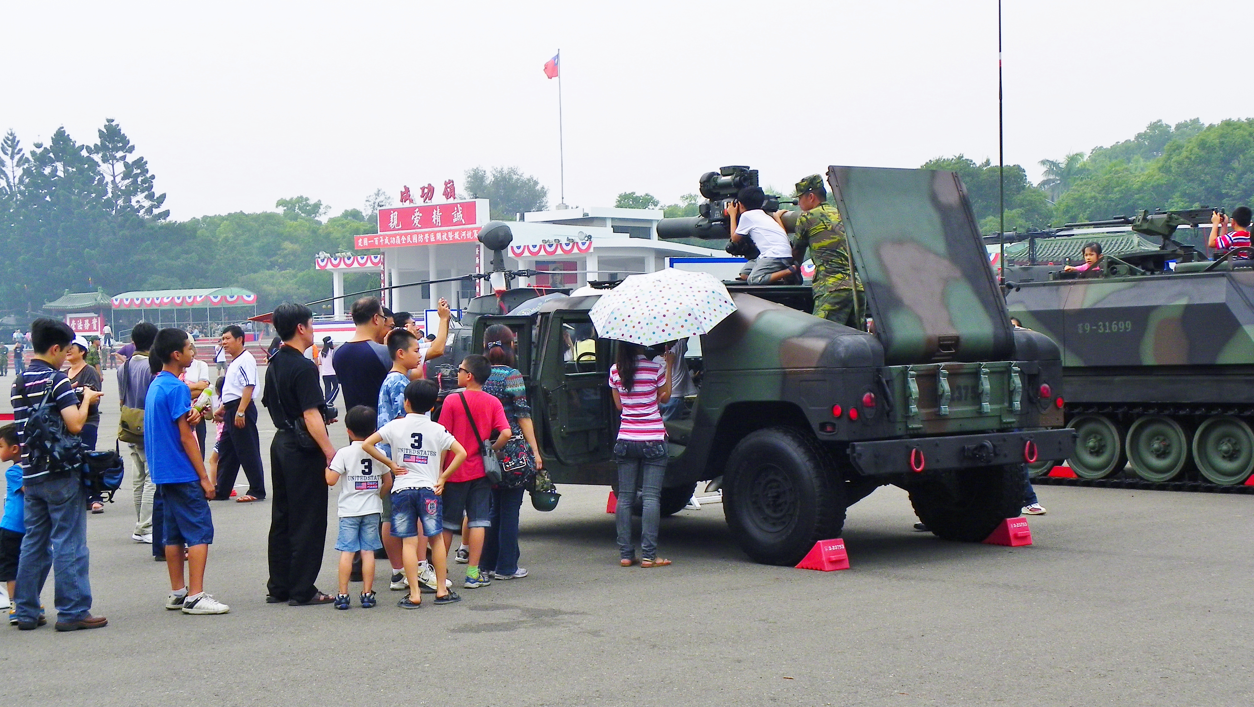 2011年陸軍成功嶺營區開放活動中，參觀者體驗悍馬拖式飛彈車發射器操作瞄準。